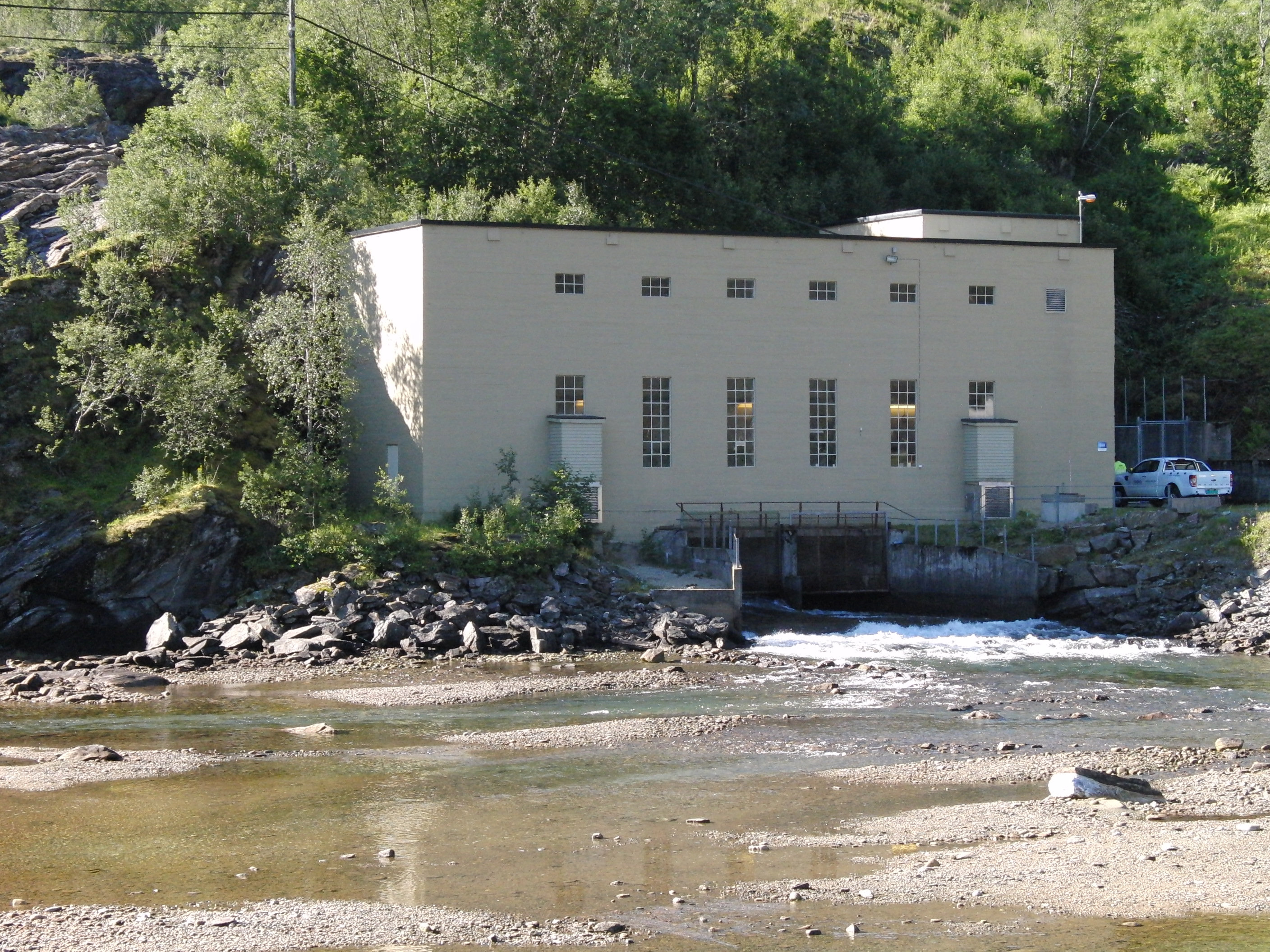 Sjøfossen kraftverk